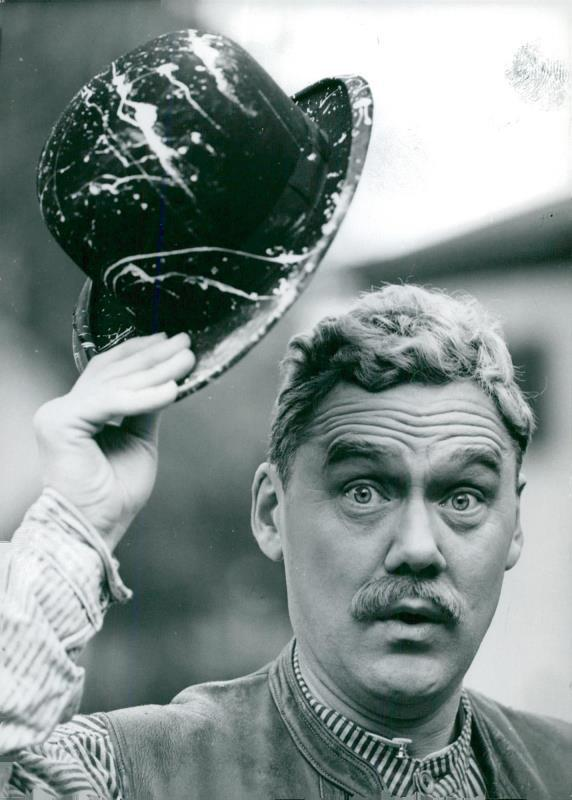 Olof Thunberg i Parkteaterns "Söderkåkar". Infört i Svenska Dagbladet 1964-06-11 sid 17.